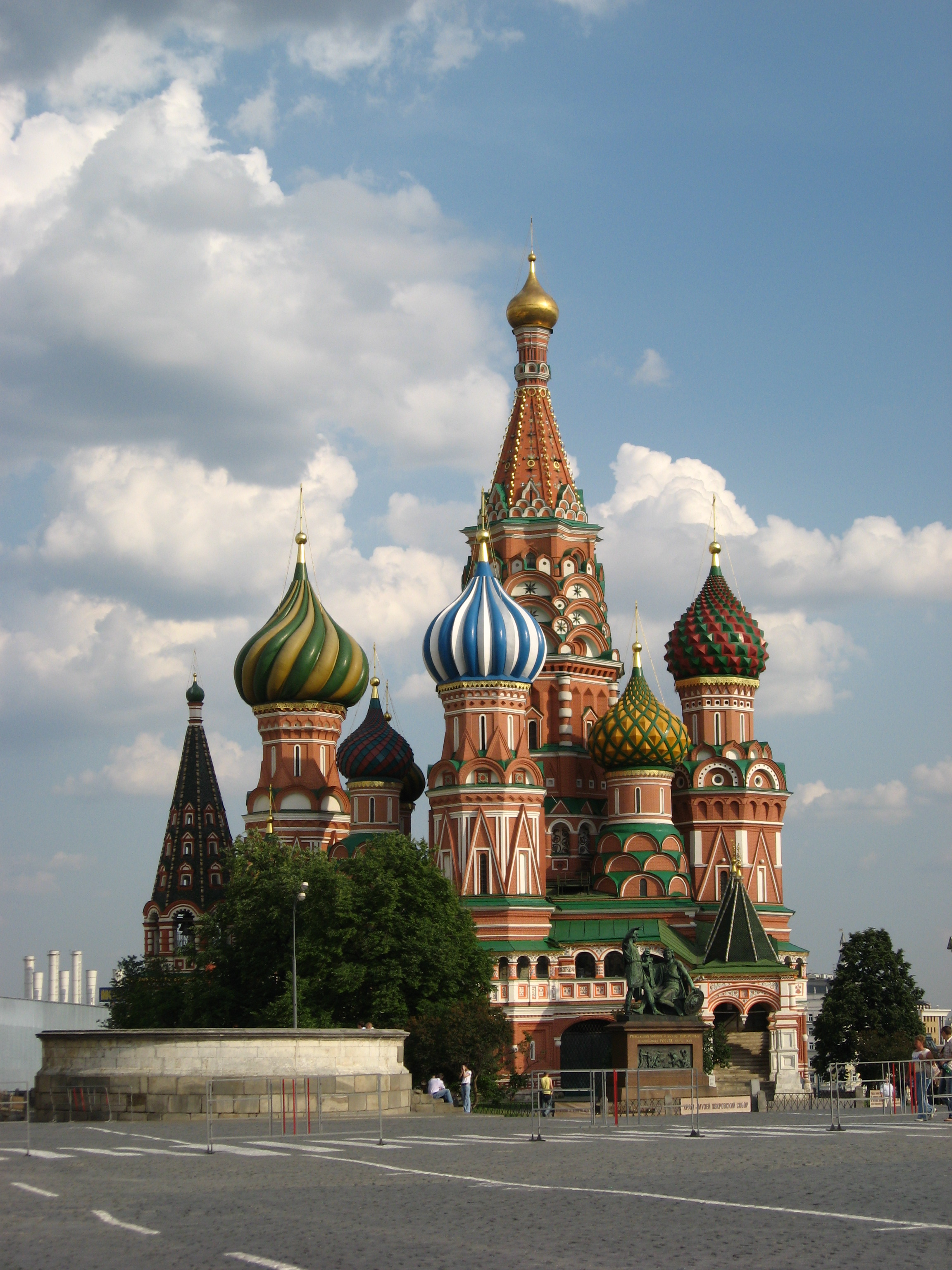 Собор Василия Блаженного